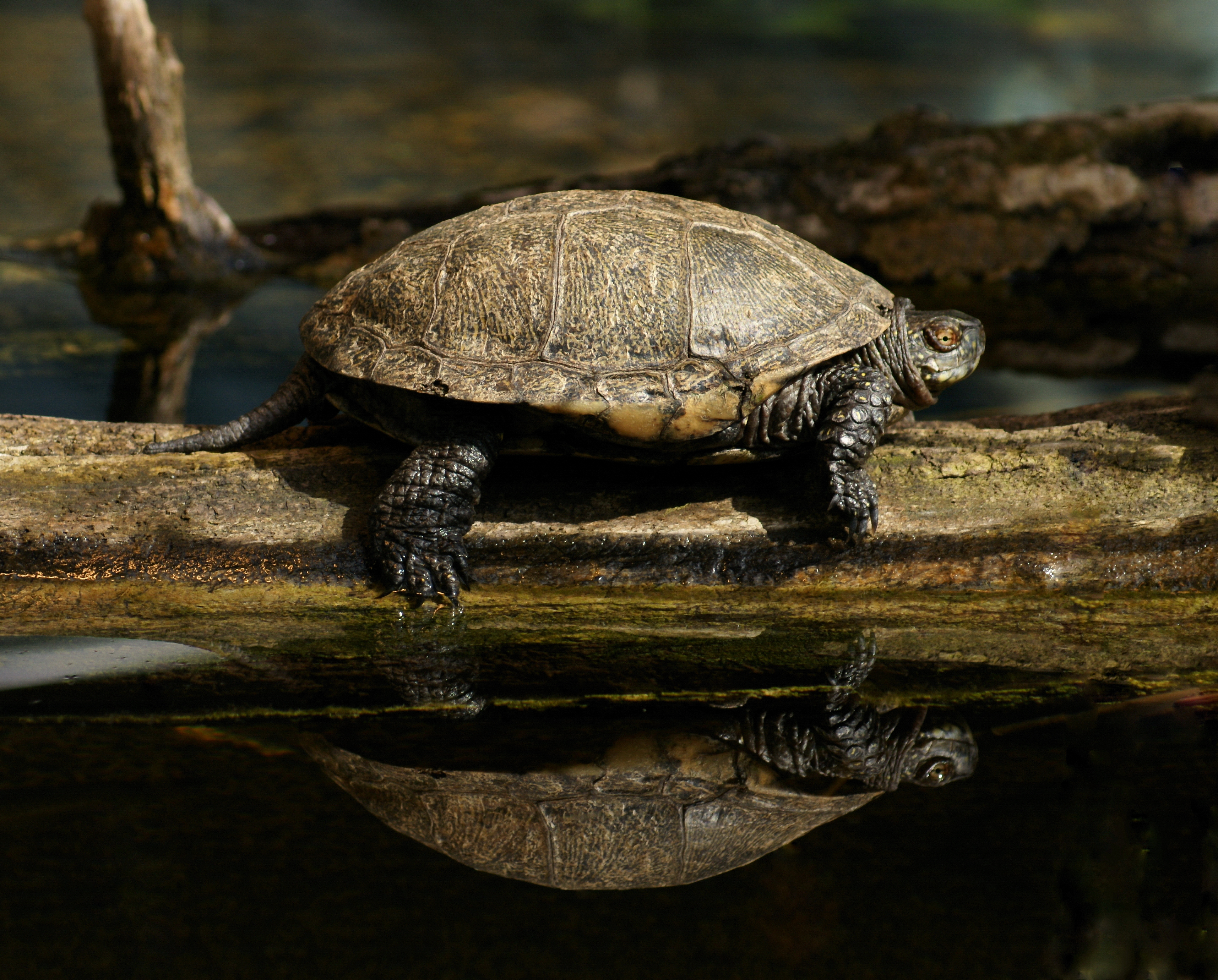 Die Europäische Sumpfschildkröte (Emys orbicularis) ist eine kleine bis mittelgroße, fleischfressende und überwiegend im Wasser lebende Schildkröte. Sie ist die einzige Schildkrötenart, die – wenn auch selten – in Mitteleuropa natürlich vorkommt.